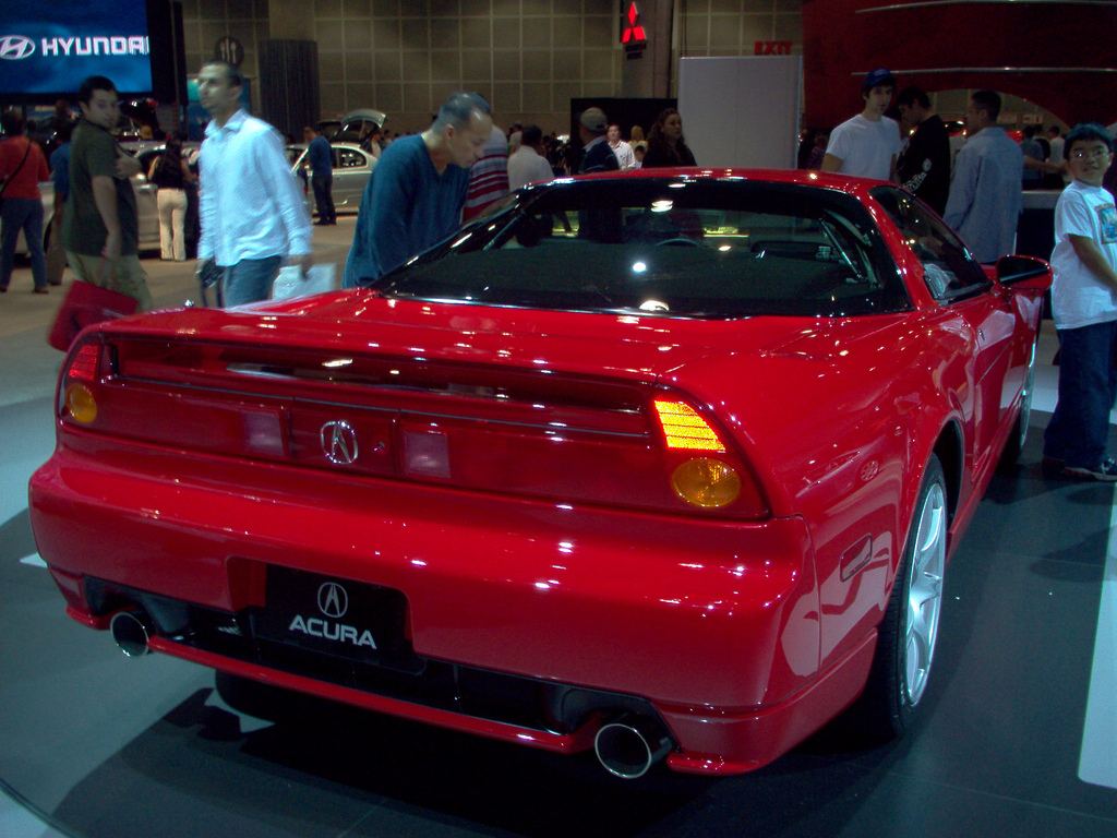 IM000788.JPG